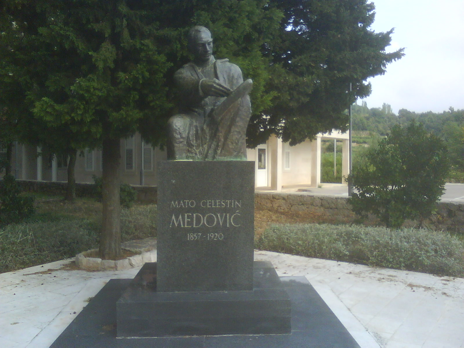 Mato Celestin Medović, spomenik u Kuni